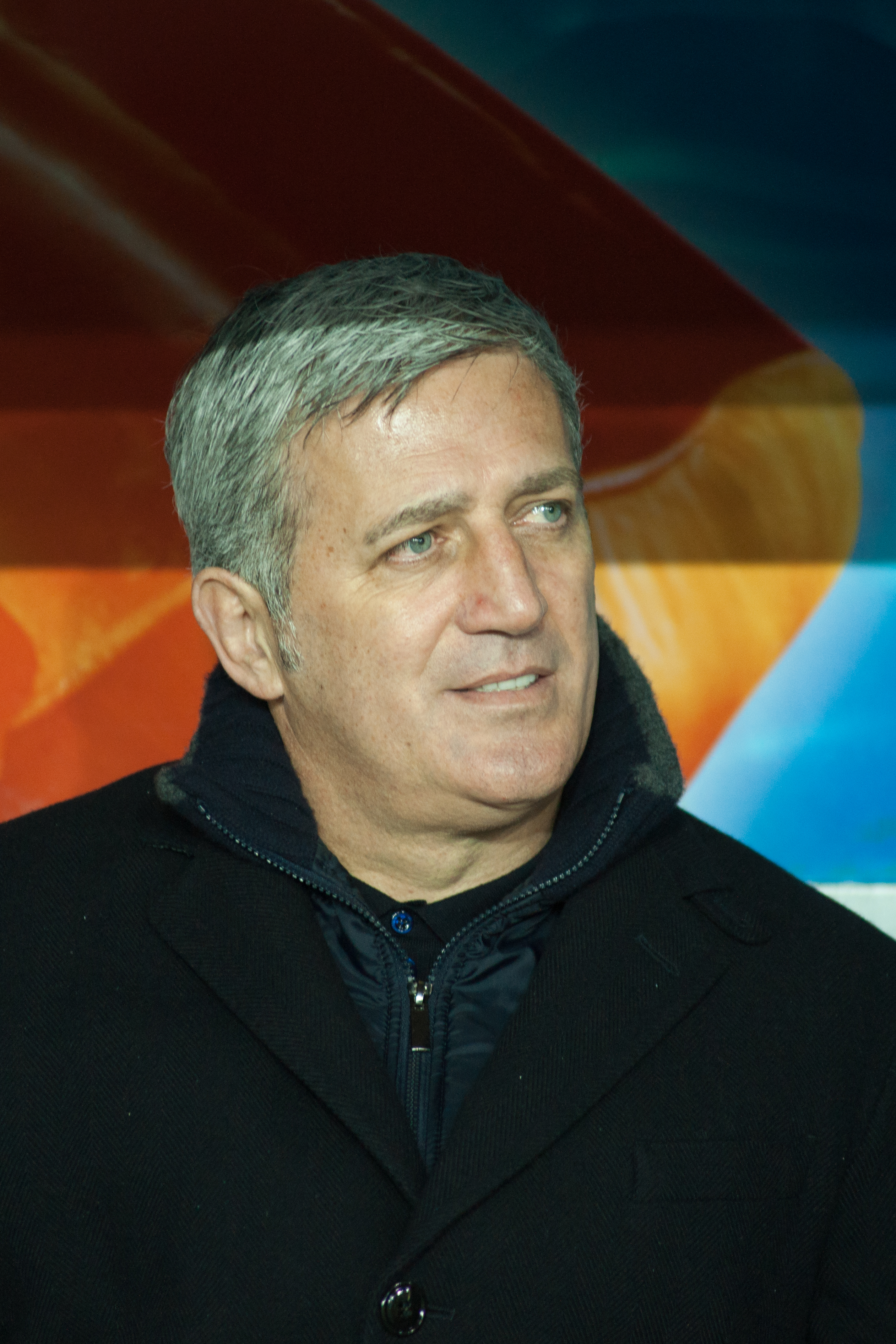 Football against poverty 2014 - Vladimir Petković